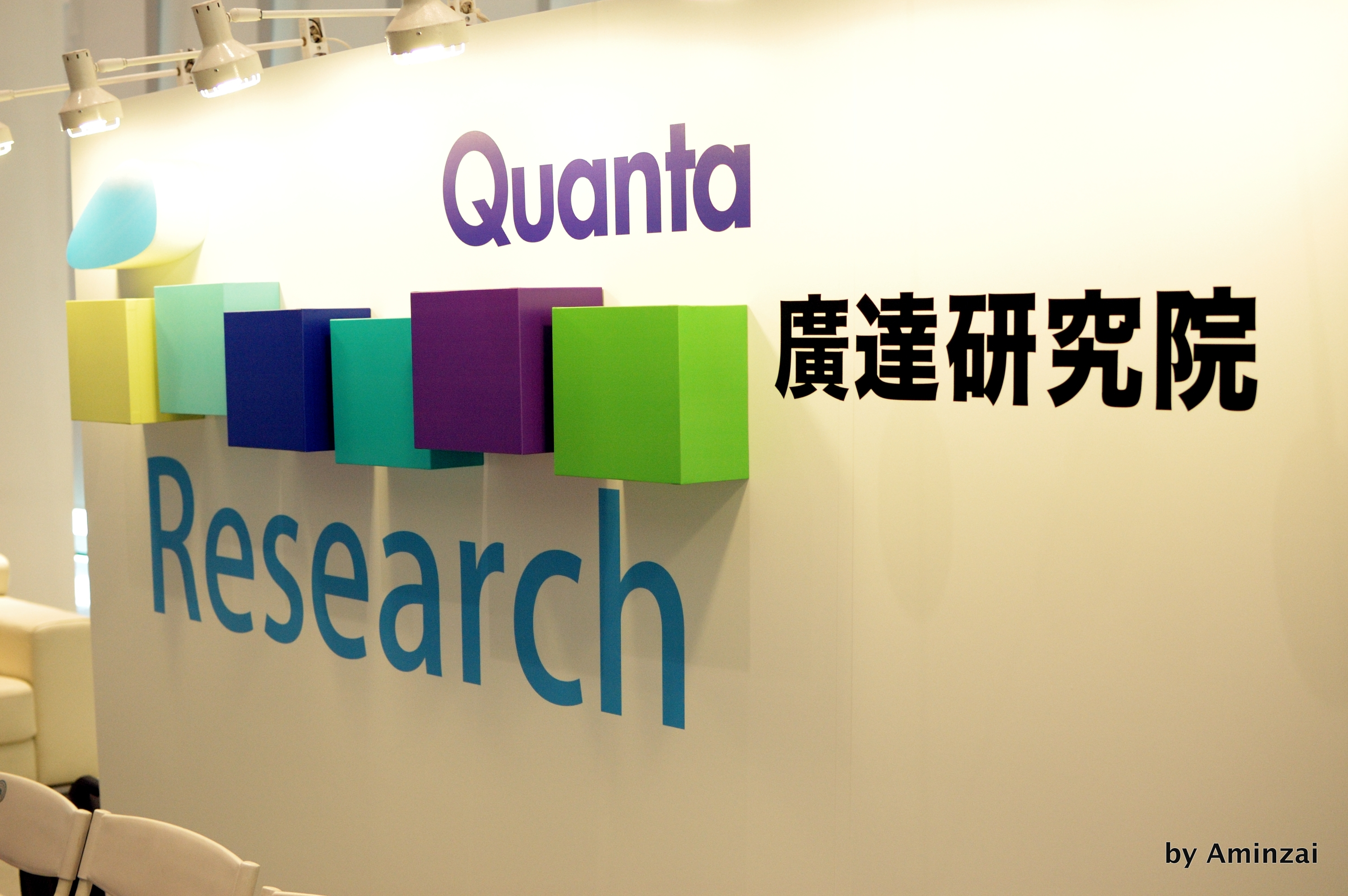 COSCUP 2012的廣達研究院攤位背景牆。